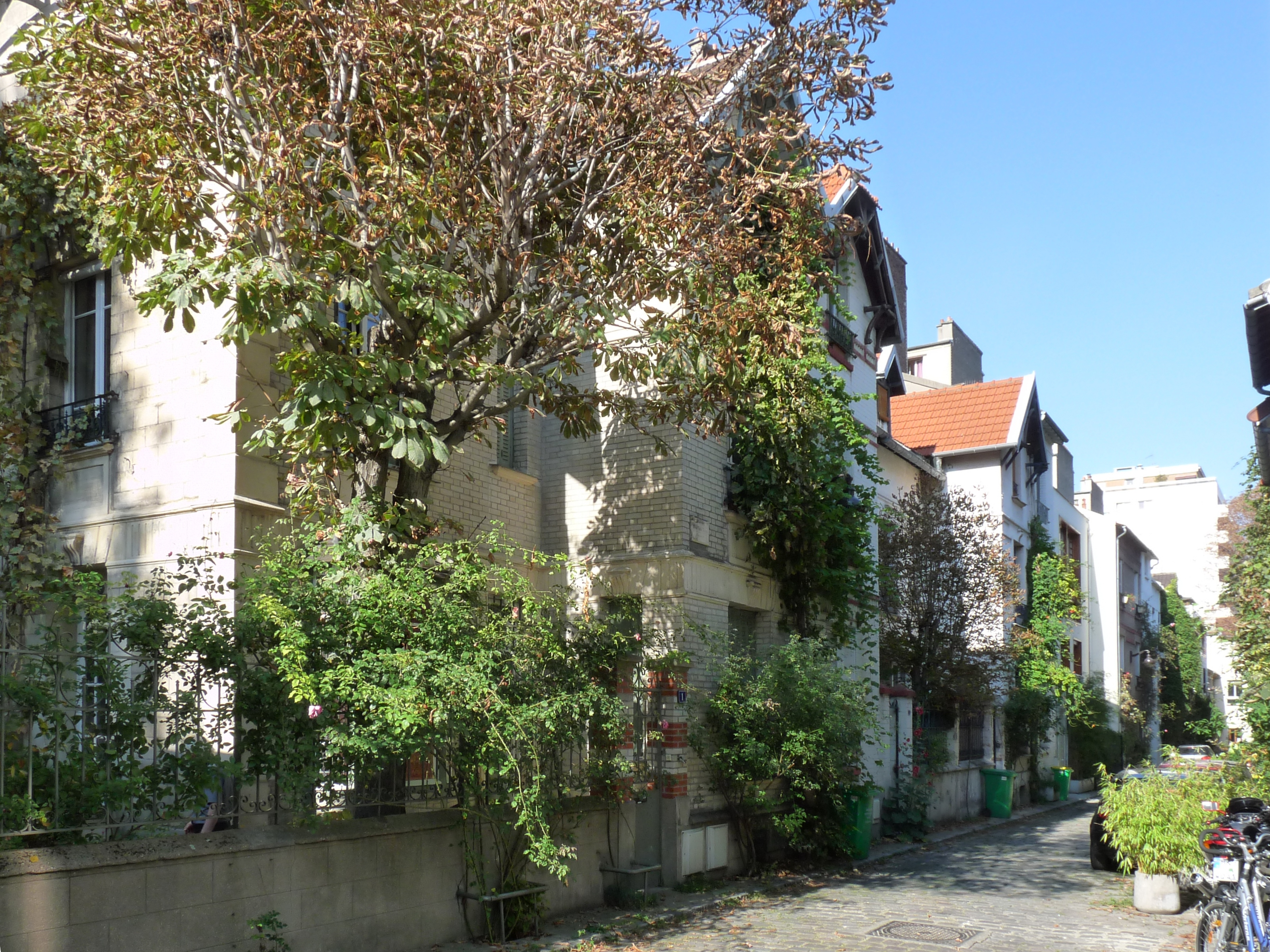 La villa Santos-Dumont à Paris